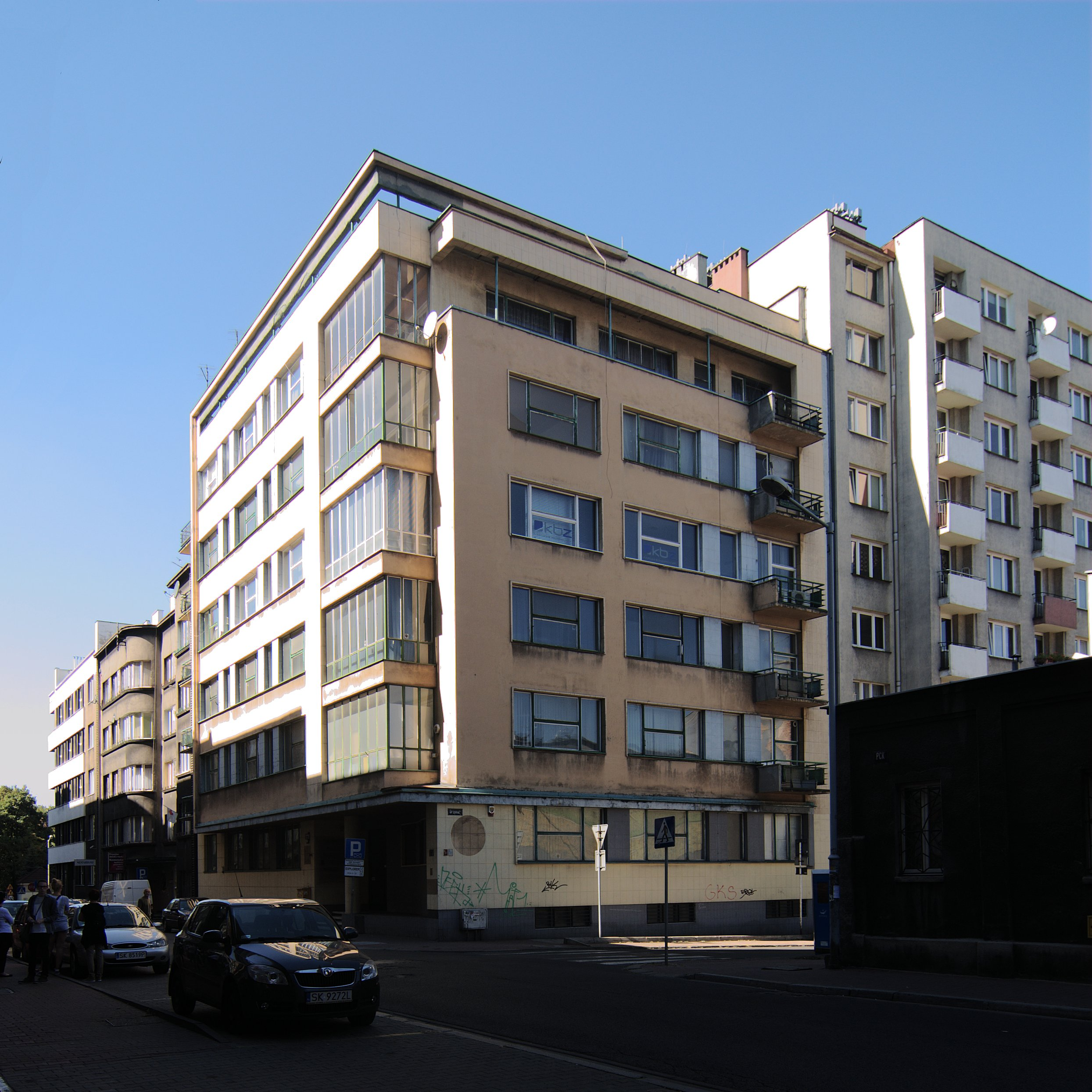 Katowice. Kamienica PCK 6.